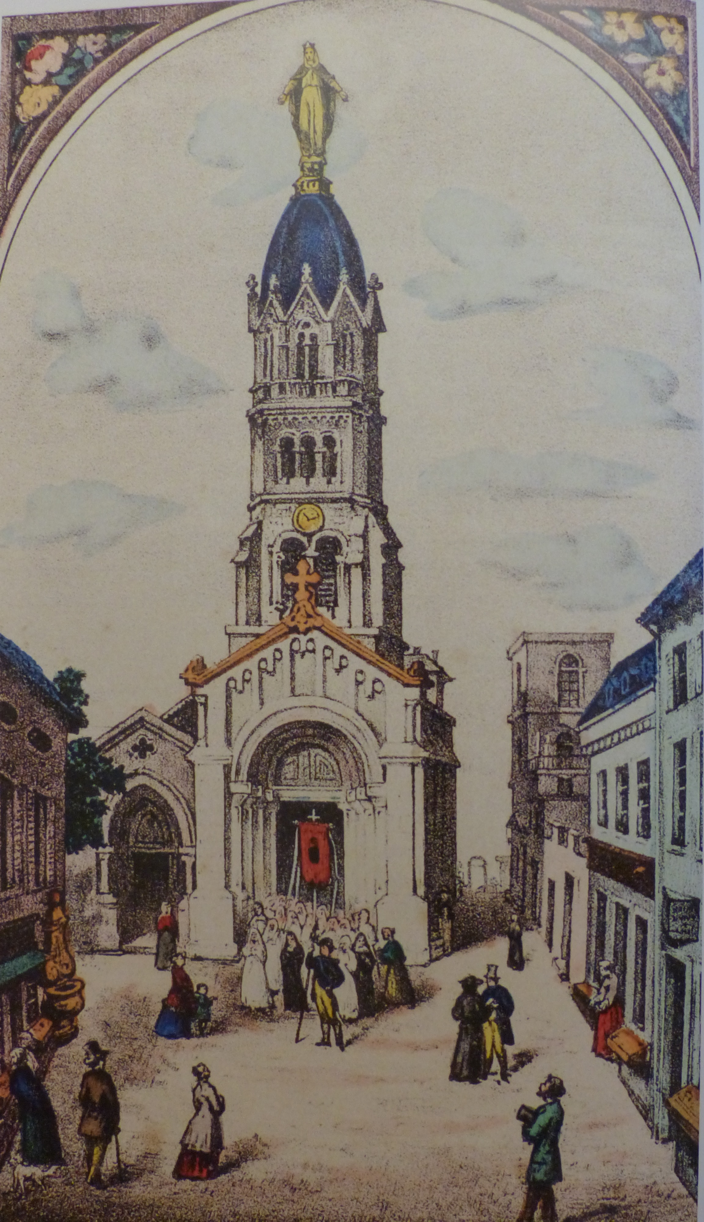 Image d'Épinal montrant le porche et le clocher de la chapelle Saint-Thomas de Fourvière, alors que le clocher est déjà surmonté de la statue de Marie, mais que la basilique n'est pas encore construite.